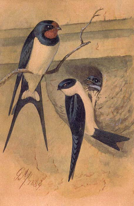 Aquarell vom deutschen Tiermaler Gustav Mützel